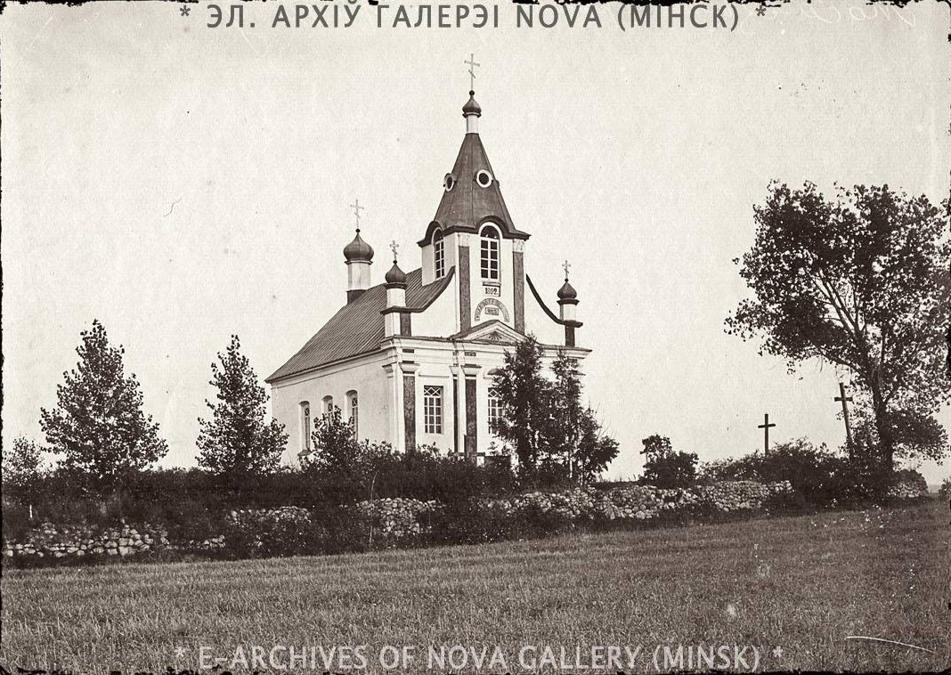 Беларуская (тарашкевіца): Масаляны (Masalany). Царква